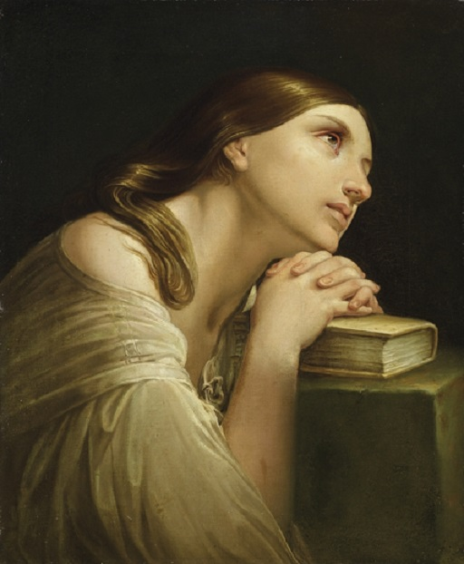 La preghiera, olio su tela, 42 x 52 cm., Galleria d'arte moderna e contemporanea, Ferrara